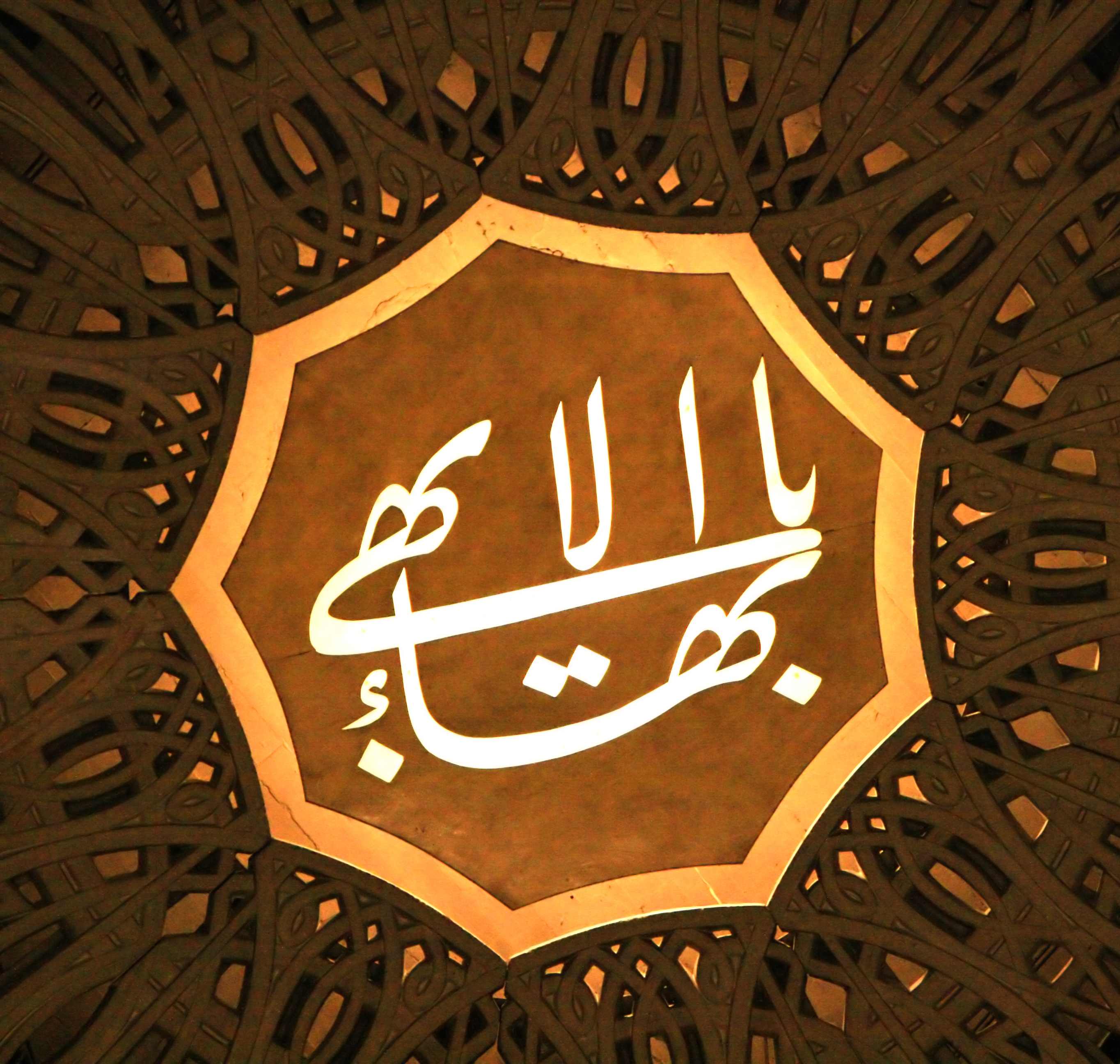 Il Più Grande Nome, in cima nell'interno della cupola del tempio bahai di Wilmette, Illinois.